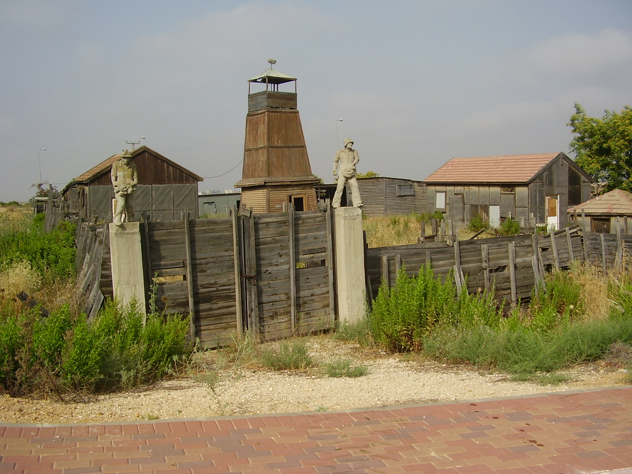 שחזור חומה ומגדל בכפר מנחם